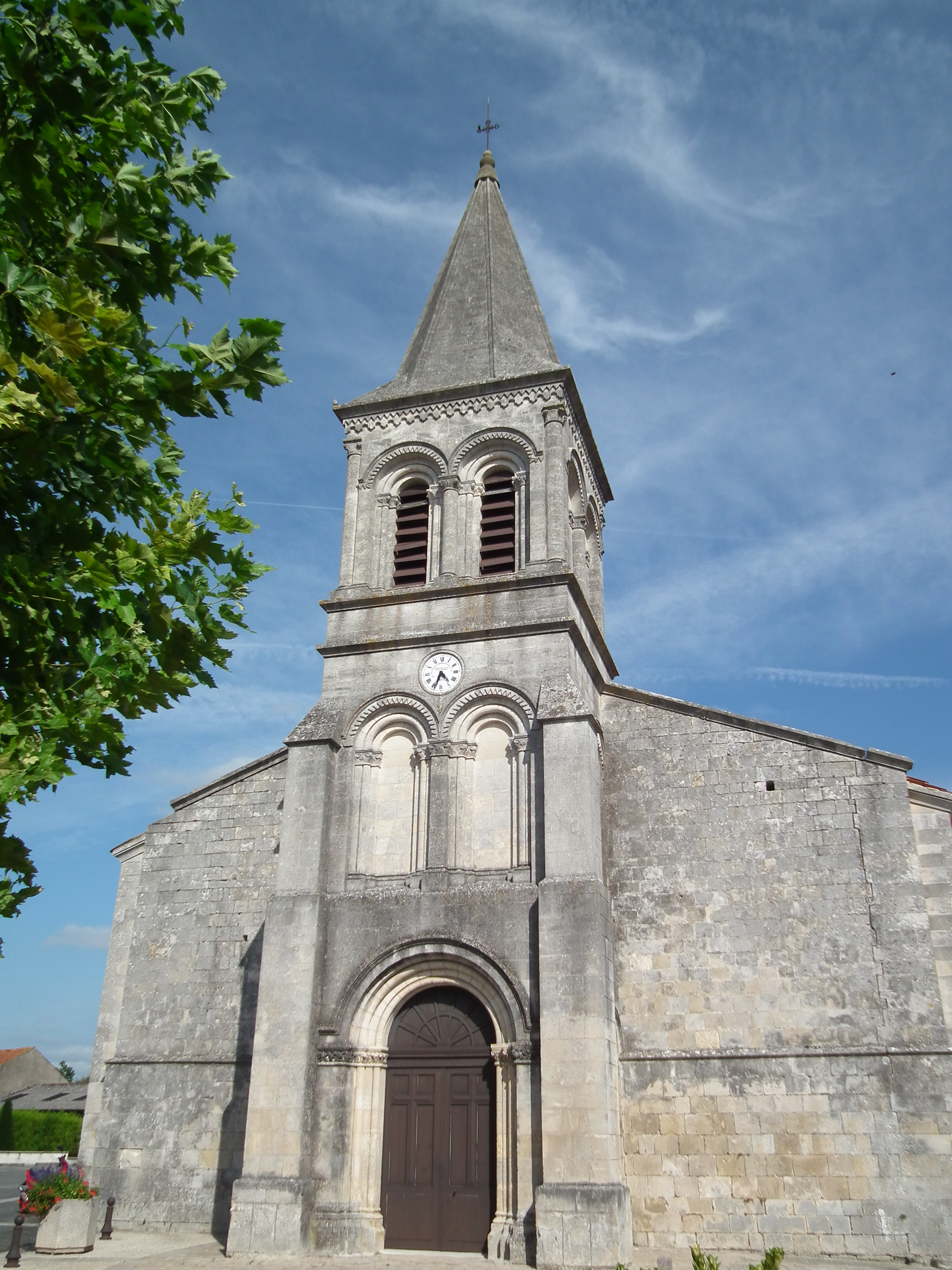 L'église de la Transfiguration, à Jarnac-Champagne